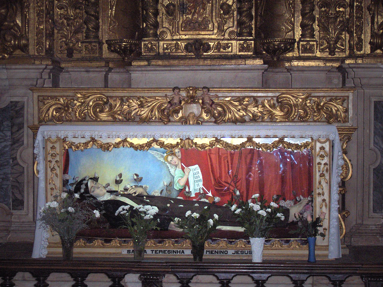 Funerary monument for Thérèse of Lisieux; Igreja de São Francisco, Évora, Portugal